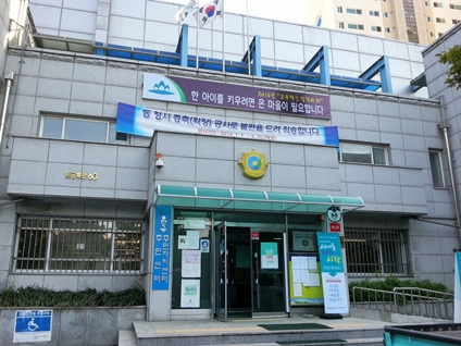 용현5동 주민센터. 인천 남구 토금북로 60